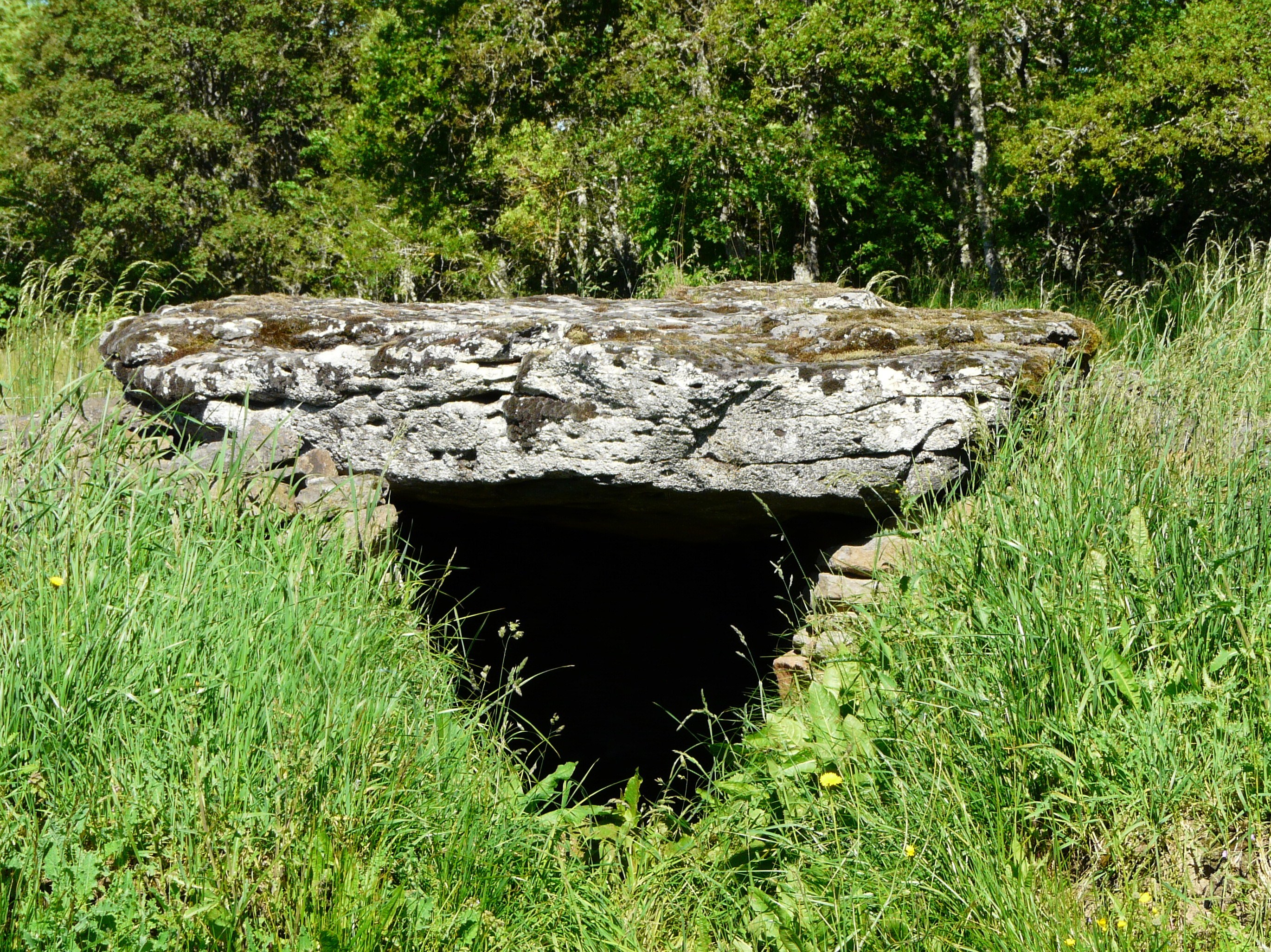 Le Dolmen de la Table au loup (ou de la Table du Loup), Sériers, Cantal, France.